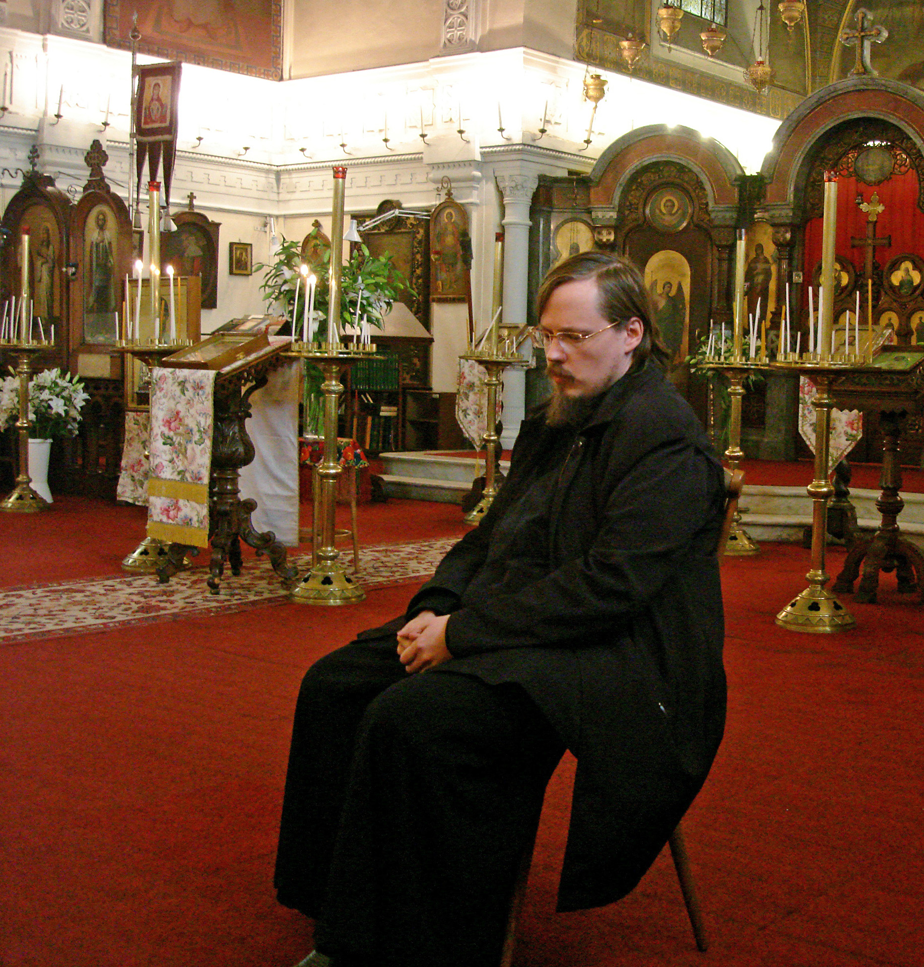 Диакон Георгий Максимов в Каннах